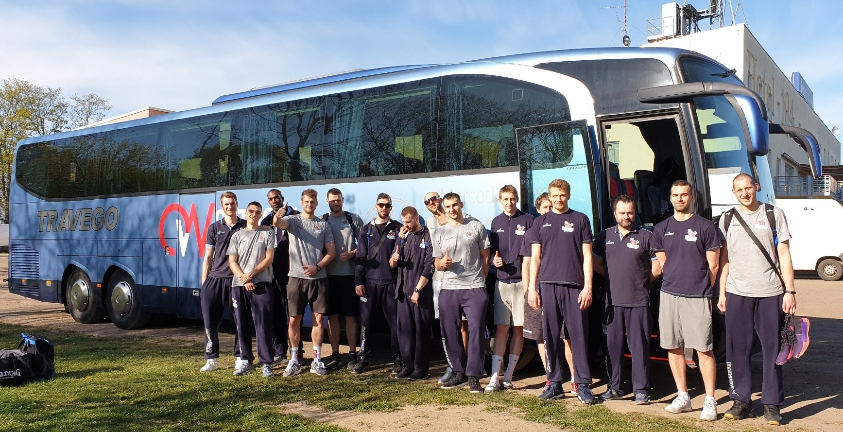 Stal Ostrów Wielkopolski